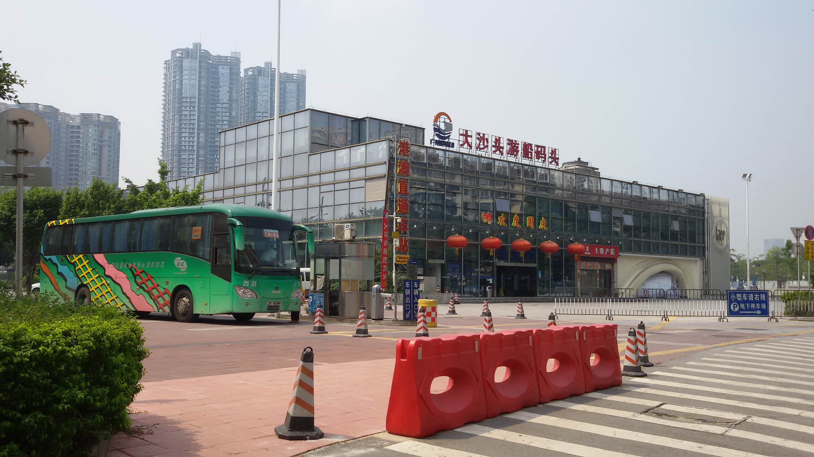 粵語: 大沙头码头